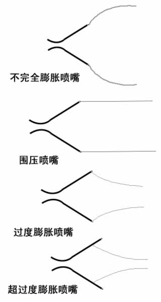 火箭发动机喷嘴类型